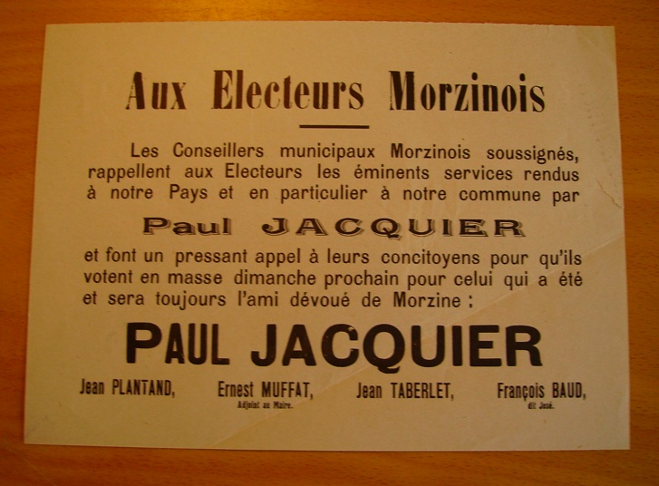 Tract de soutien à Paul Jacquier (législatives 1932)